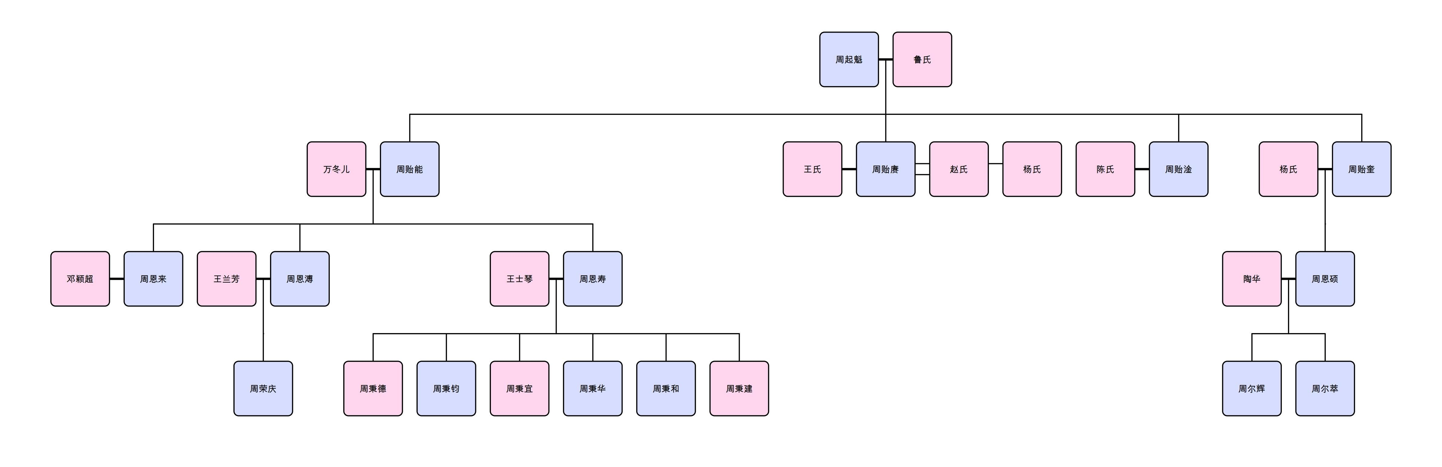 中文（中国大陆）: 本图展现了周恩来相对关系较近的亲属间的关系。